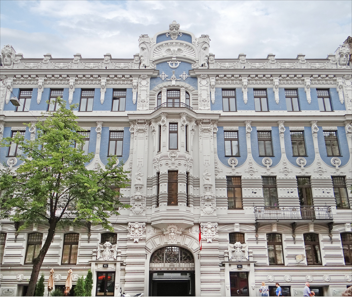 L'immeuble art nouveau (jugendstil) situé au n°10b de l'avenue Elizabeth (Elizabetes Iela) à Riga en Lettonie. Il date de 1903. Architecte : Mikhail Eisenstein (1867-1921) Article de Wikipedia sur cet architecte qui était le père du célèbre cinéaste. __________ Riga, capitale de la Lettonie, est un parfait exemple de ville Art Nouveau. Son centre abrite la plus belle concentration de bâtiments Art nouveau au monde: plus d'un tiers d'entre eux appartiennent en effet à ce style. Cet ensemble architectural est inscrit sur la liste du Patrimoine mondial.... Extrait du site du réseau des villes art nouveau